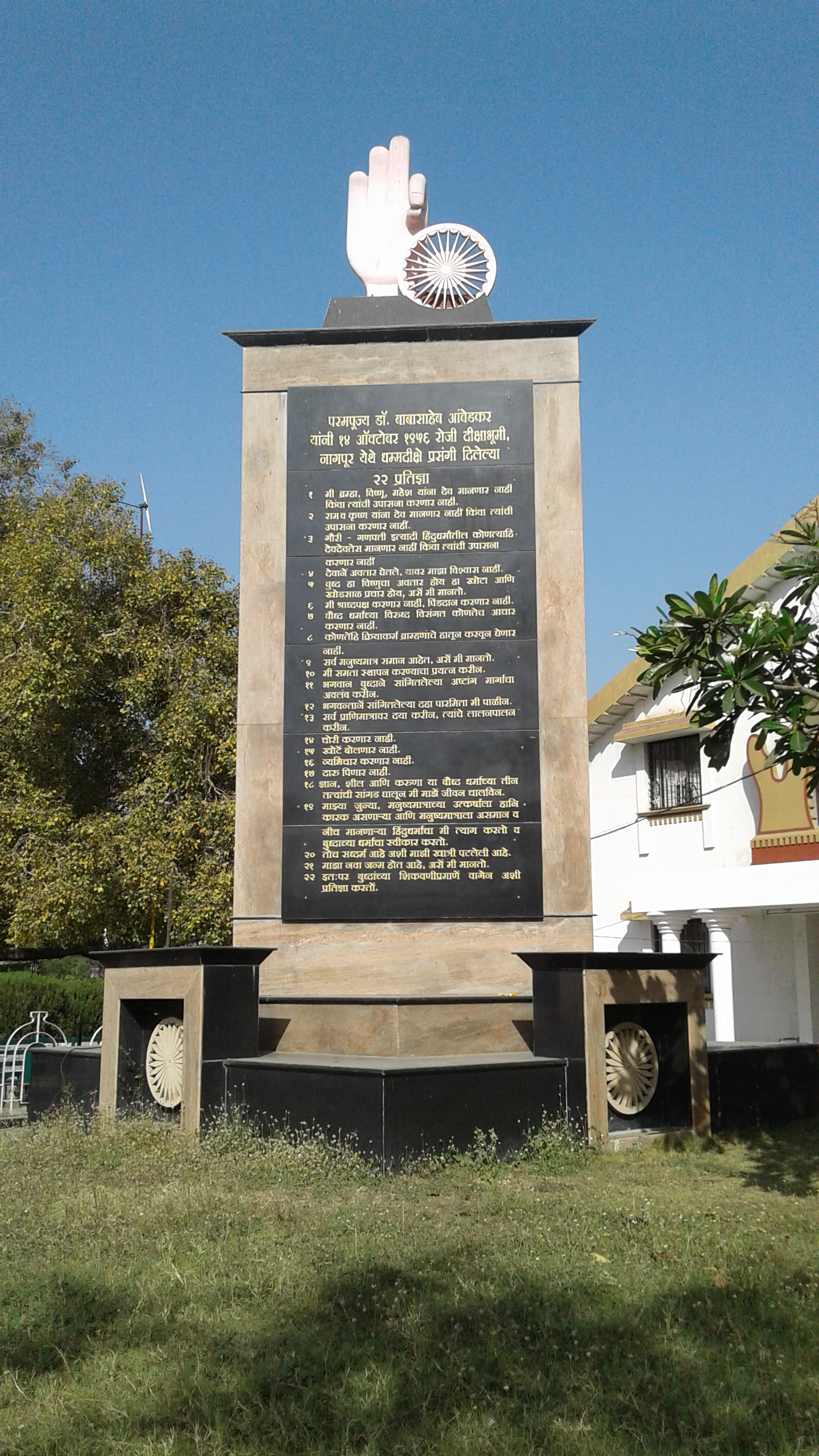 डॉ. बाबासाहेब आंबेडकर यांनी दीक्षाभूमीवर आपल्याआपल्या बौद्ध अनुयायांना दिलेल्या २२ प्रतिज्ञा, दीक्षाभूमीतील शिल्पात कोरलेल्या